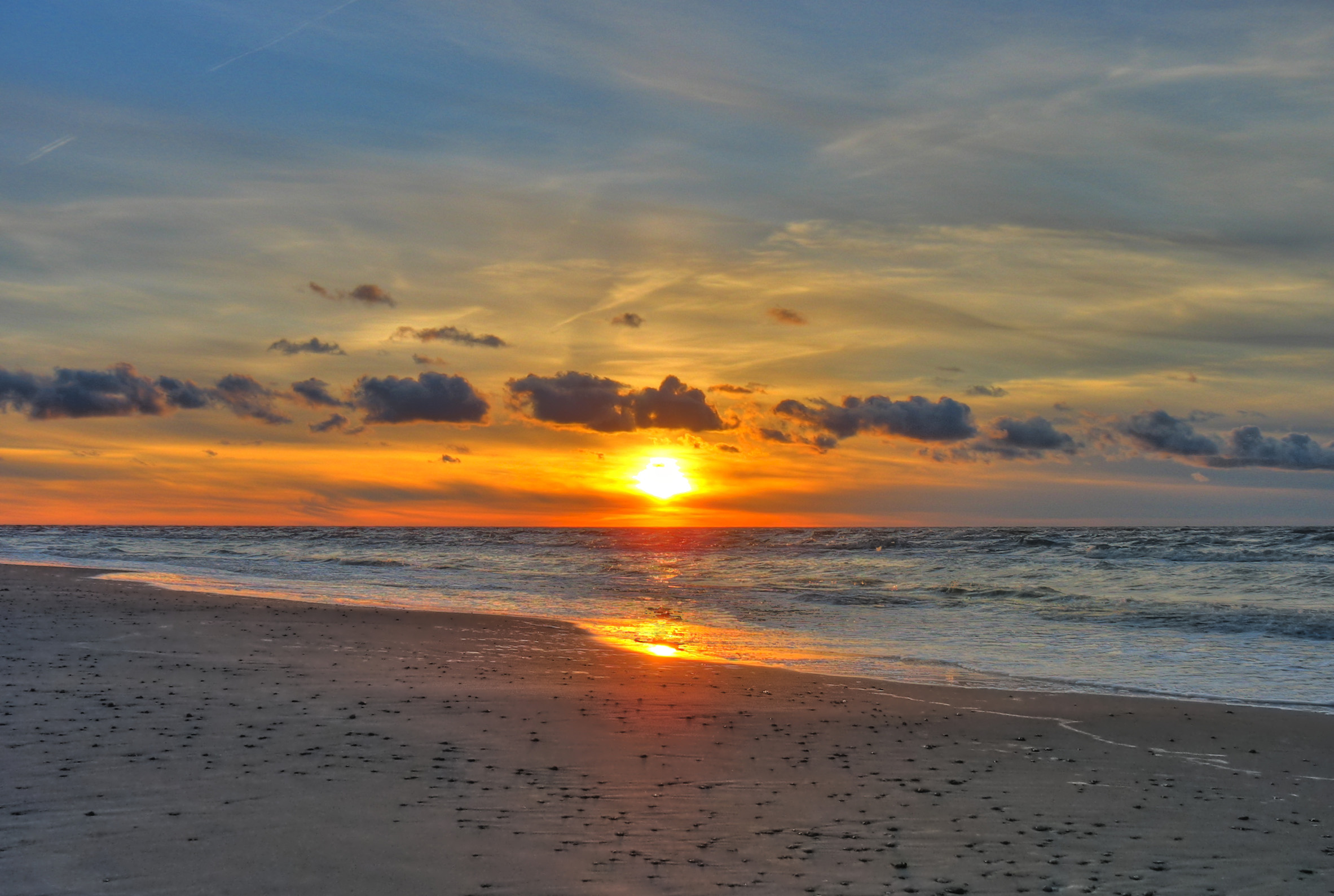 Saka parish, LV-3466, Latvia